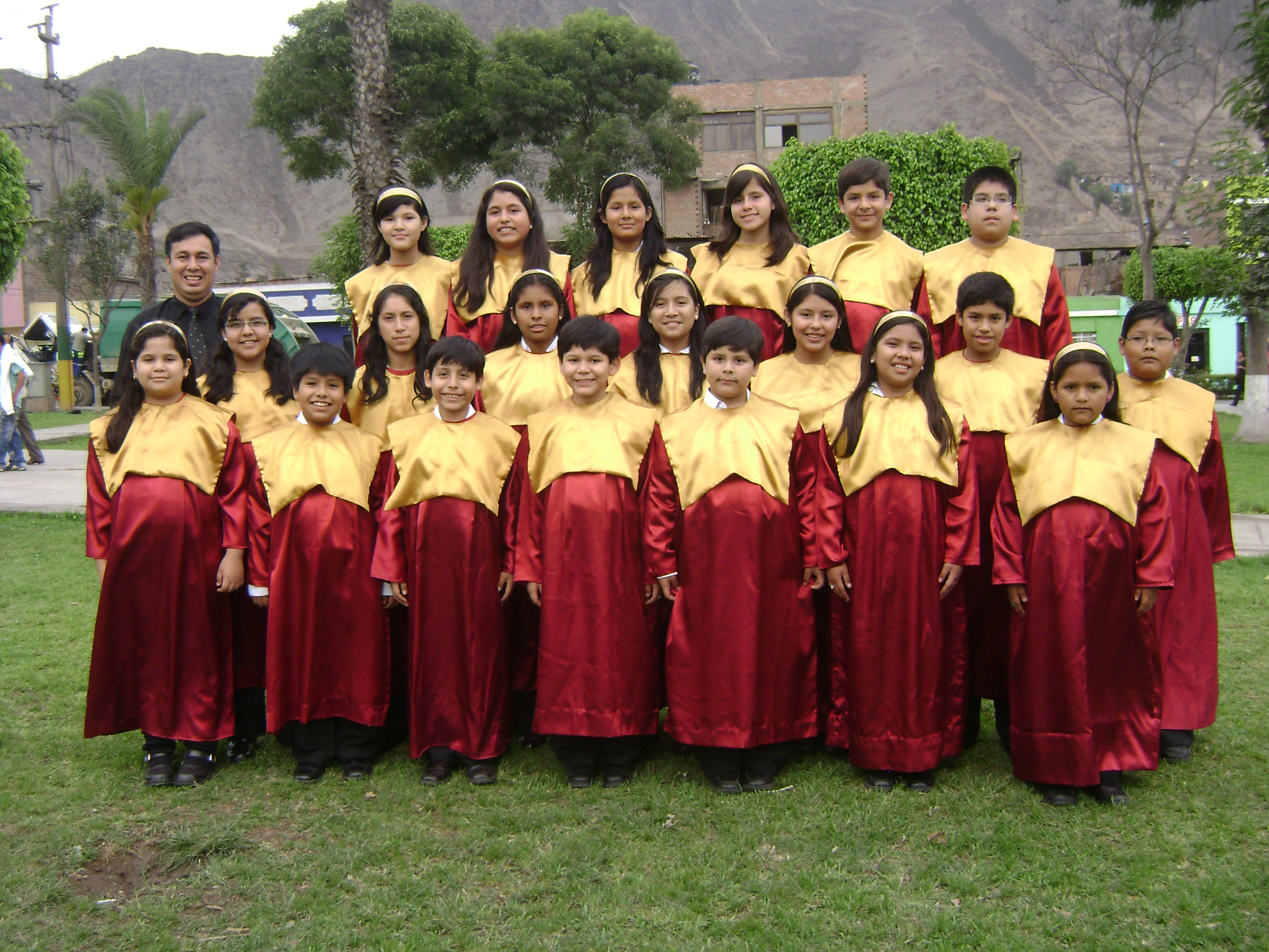 Coro de Niños de El Agustino (Enero 2010)